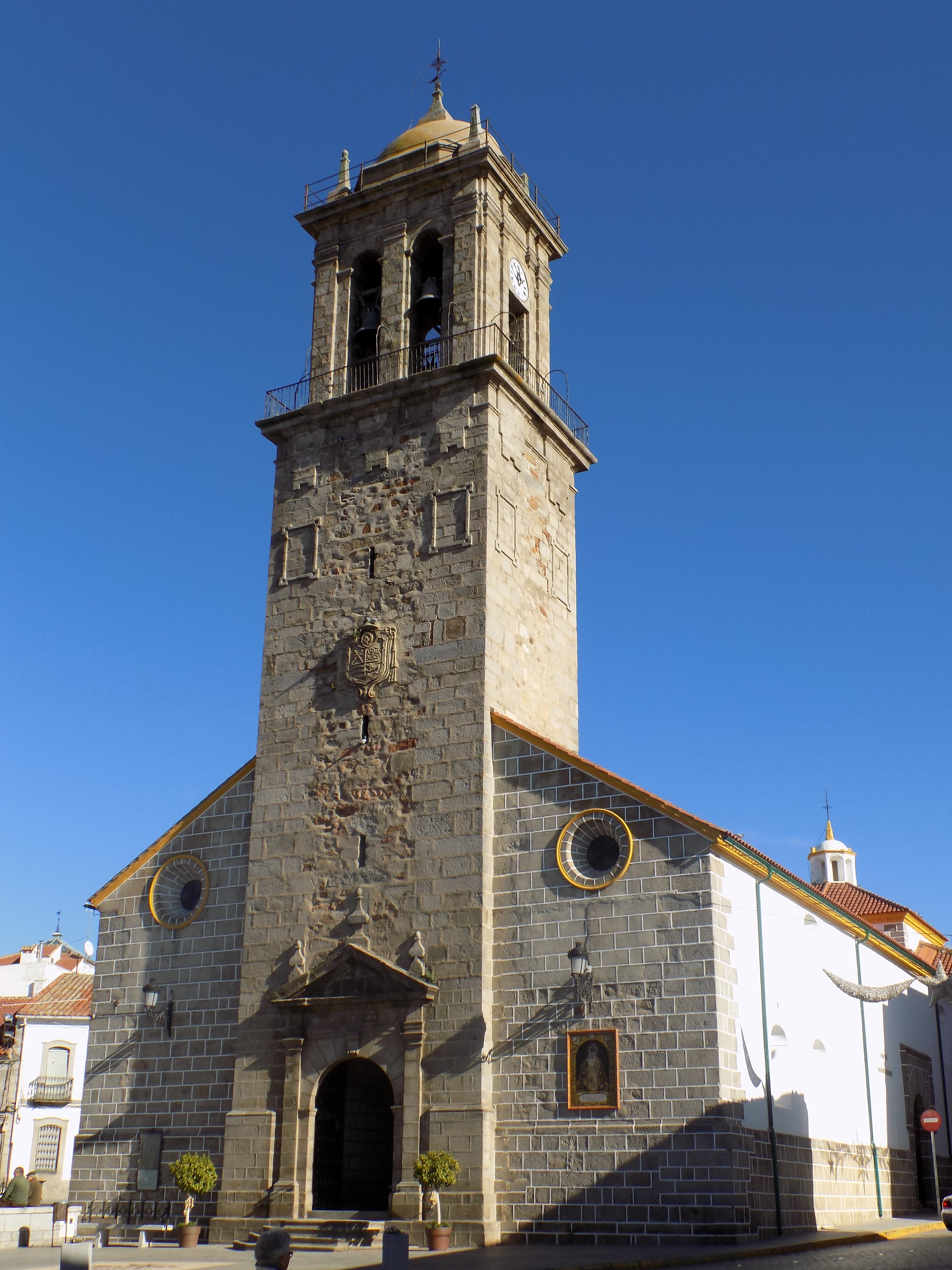 Torre de la iglesia de San Miguel Arcángel de Villanueva de Córdoba, provincia de Córdoba, (Spain).